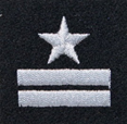 Major ZS